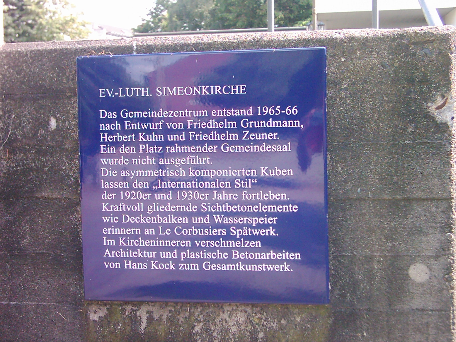 Hinweistafel der ehemaligen Simeonkirche in Hamburg-Hamm.